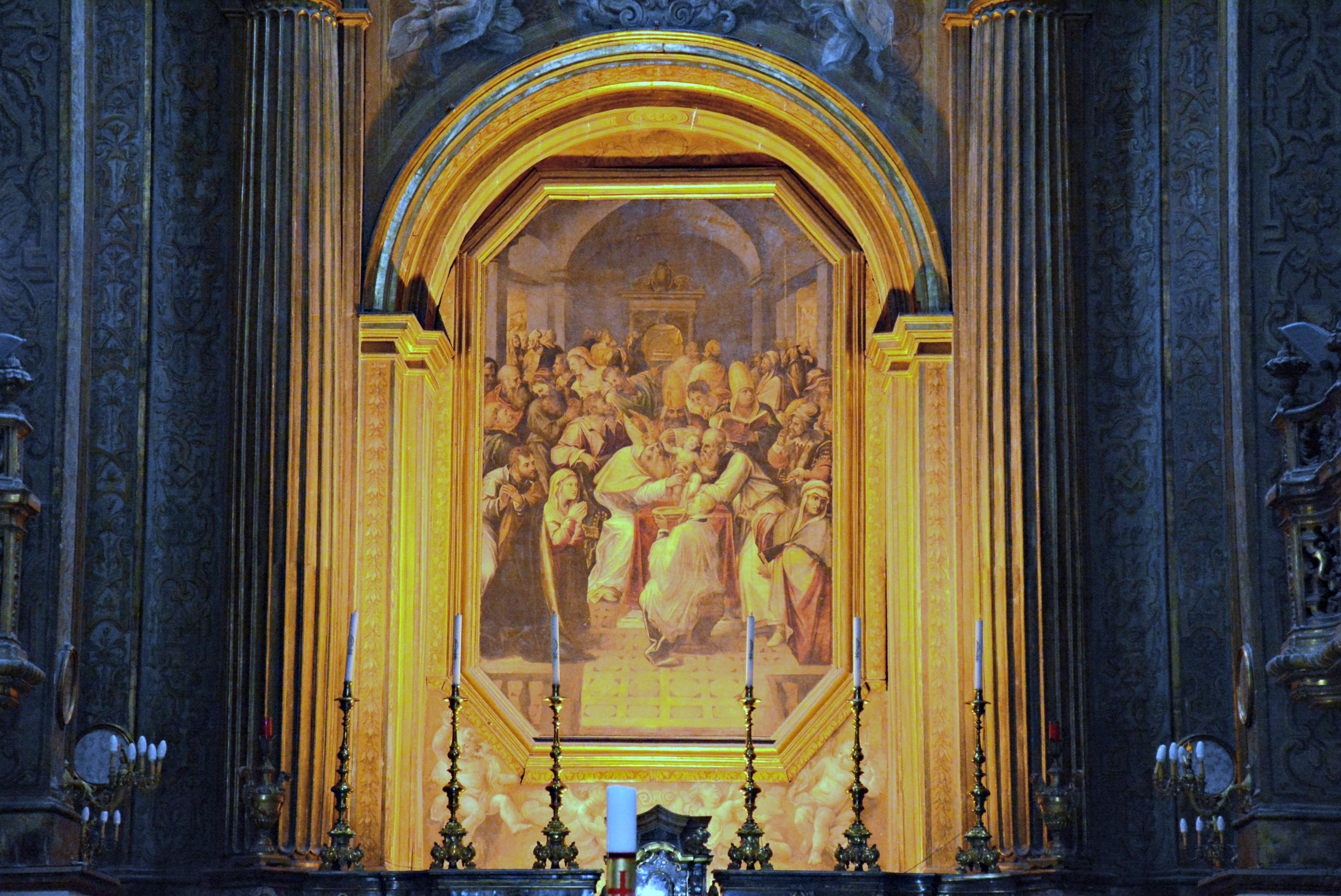 Vedi titolo